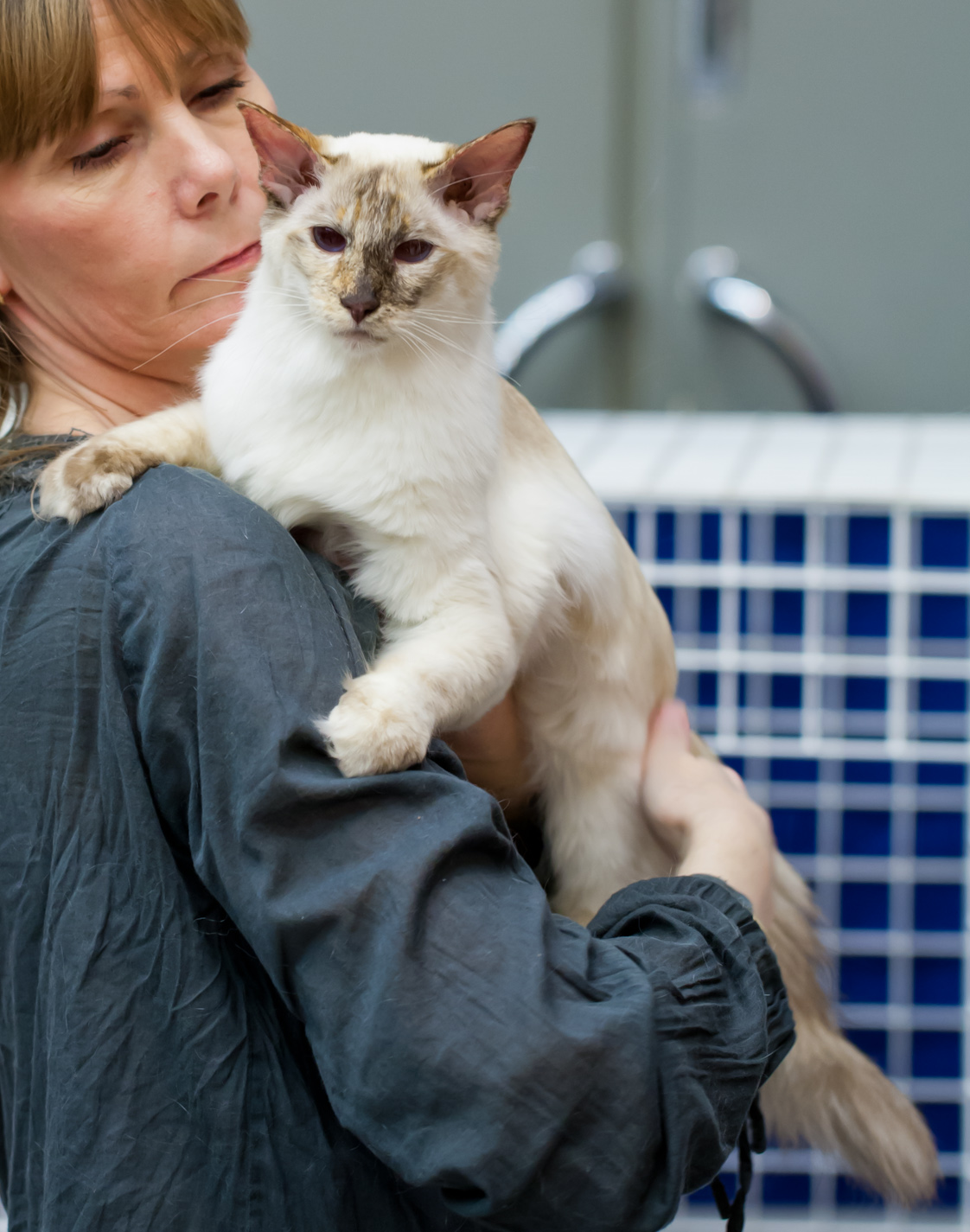 Balinais au TUROK cat show Turku en 2012. Couleur : chocolat tortie point. Code EMS : BAL h Description originale